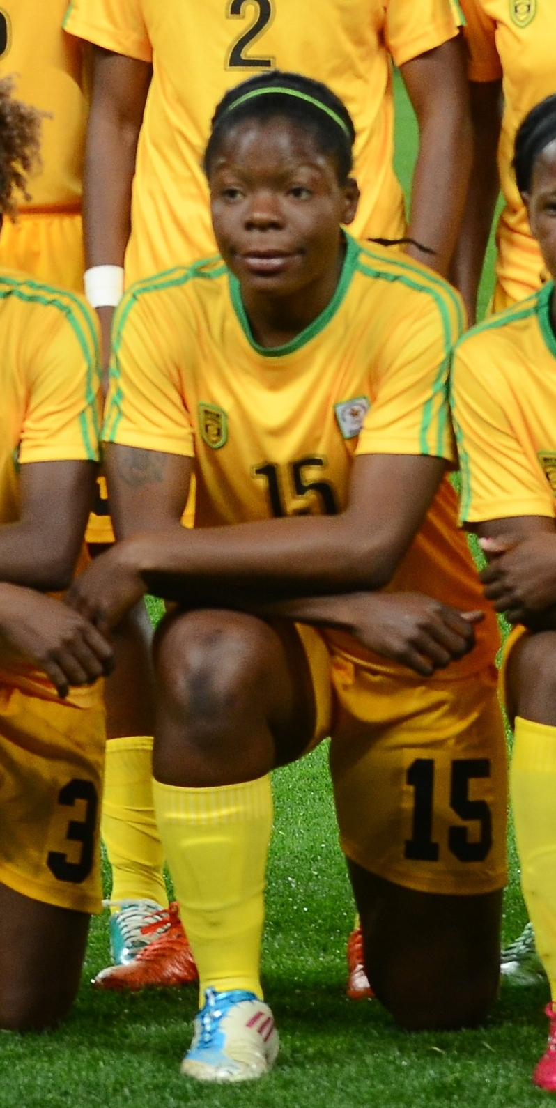 São Paulo - Seleções femininas do Zimbábue e da Alemanha se enfrentam na Arena Corinthians (Rovena Rosa/Agência Brasil)